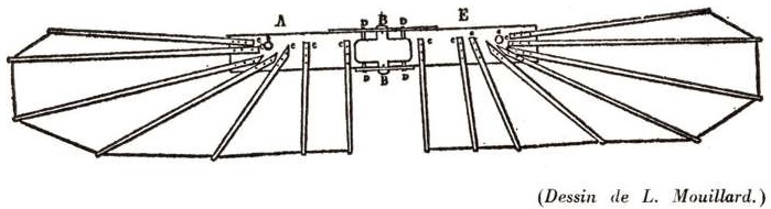 Le charognard, dessin de Louis Maillard